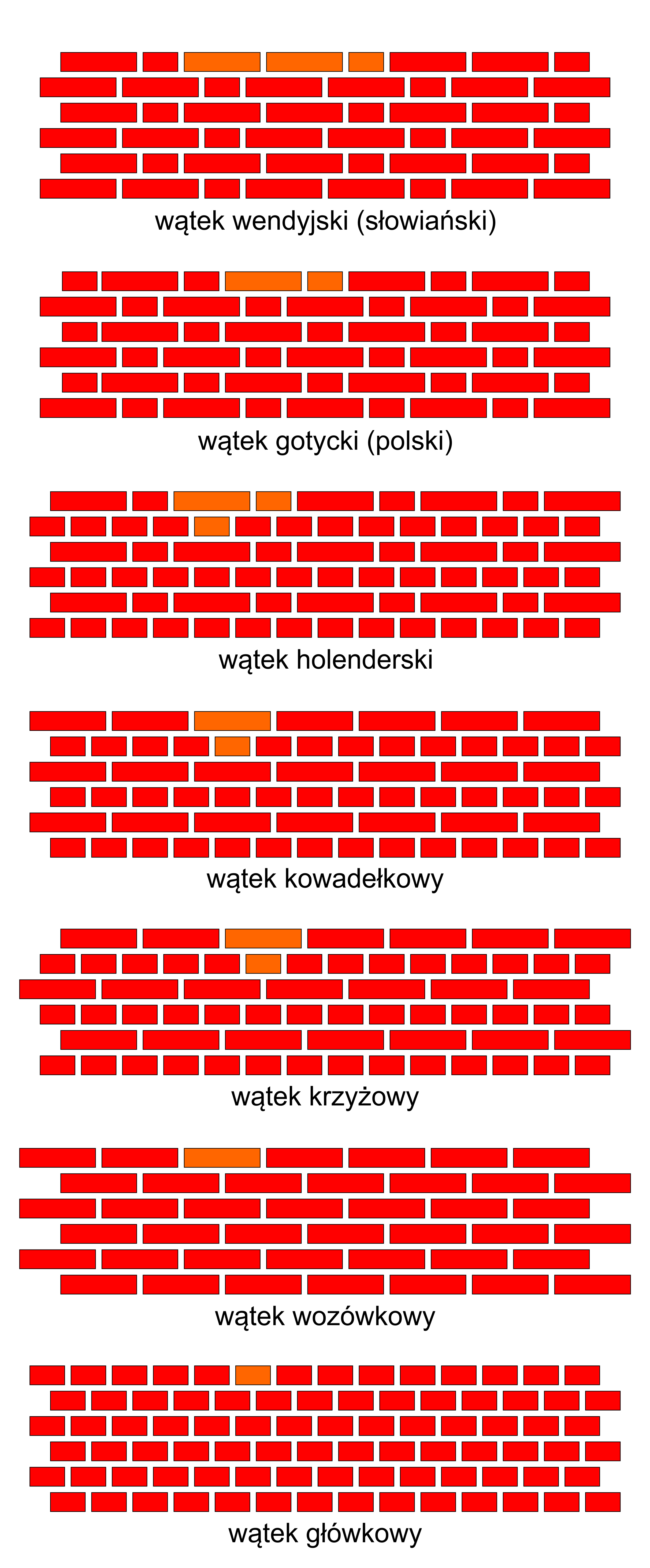 Wątki murów ceglanych - źródło: Słownik Terminologiczny Sztuk Pięknych, PWN, Warszawa 1969